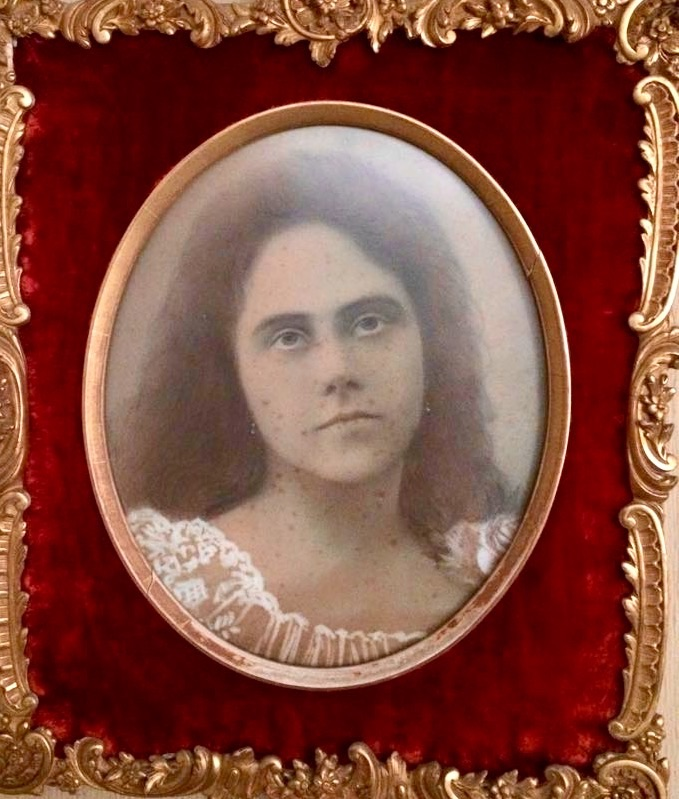 Josefina Azmitia Gómez en 1910. Era hija del intelectual Agustín Gómez, hermana del escritor Enrique Gómez Carrillo y esposa del patriota guatrmalteco José Azmitia.